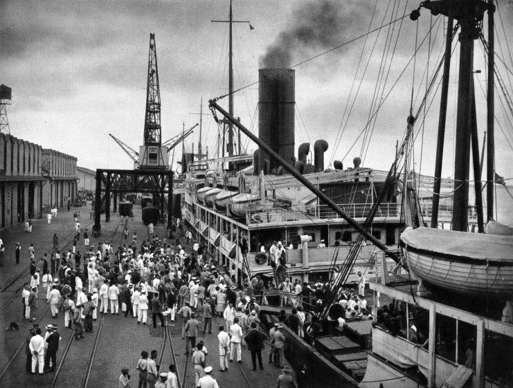 Paquete Angola de partida do porto de Lourenço Marques